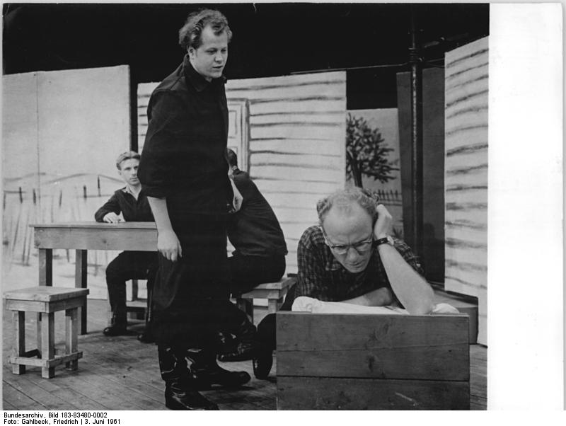 IG Wismut Aue, Probe der Laienspielgruppe Zentralbild Gahlbeck 3.6.61 Ni-Ga Arbeitertheater der IG Wismuth Aue bereitet sich auf III. Arbeiterfestspiele vor. Die Mitglieder des Arbeitertheaters der IG Wismut - es spielen Hauer, Steiger, Laborantinnen und Hausfrauen - studieren unter der Leitung der Schauspielerin Käte Rudolf vom Kreistheater Annaberg das Schauspiel von Alexej Arbussow "Eine Geschichte aus Lekutsk" für die Arbeiterfestspiele in Magdeburg ein. UBz: Hauer Lothar Straube (rechts) als Viktor und Hauerbrigadier Rudi Trott als Serdjuk.